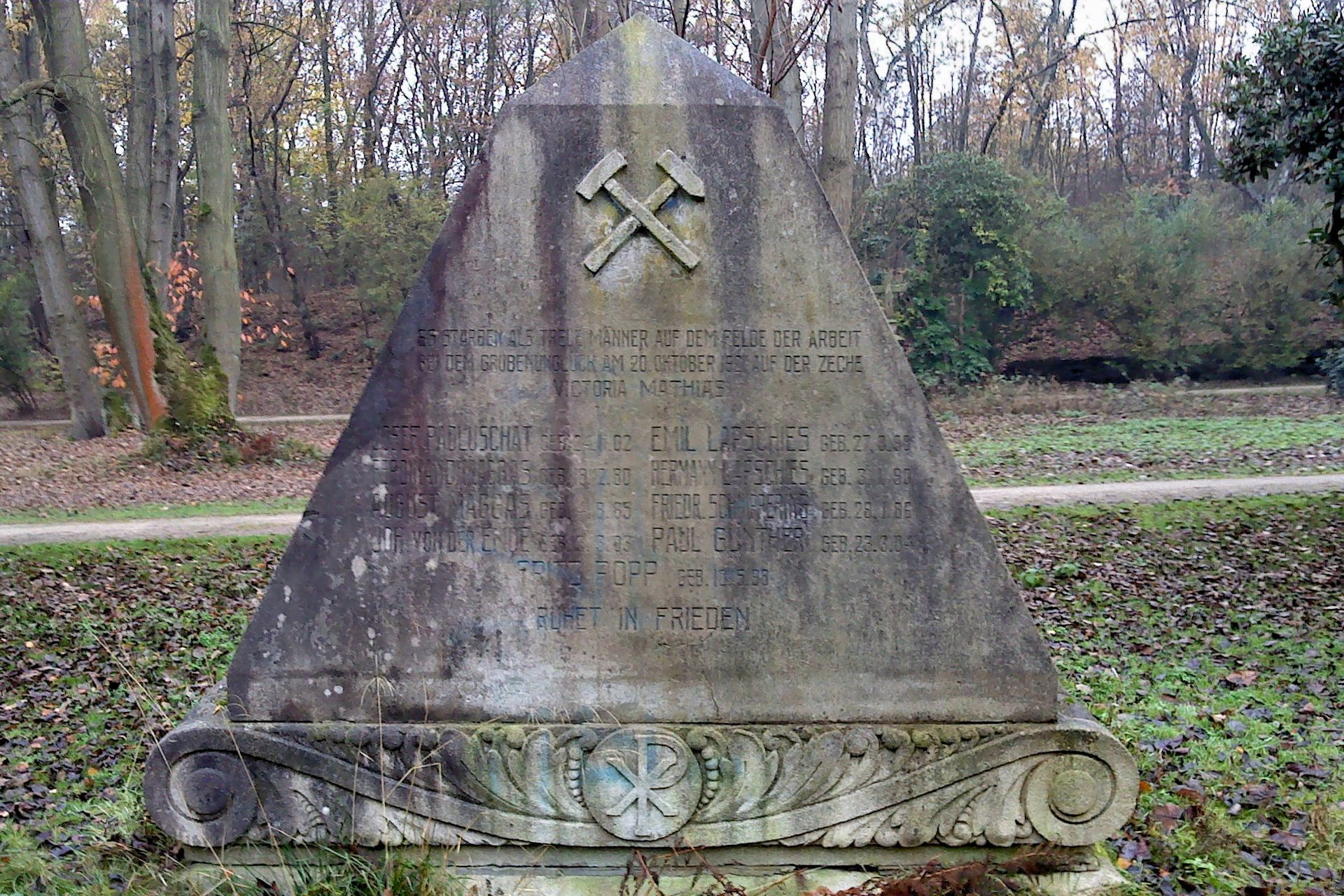 Gedenkstein auf dem Alten Friedhof Segeroth in Essen; zum Gedenken an 9 Bergleute, die bei einer Schlagwetter-Explosion, ausgelöst durch eine Grubenlampe, am 20. Oktober 1921 in Flöz Gustav auf Zeche Victoria Mathias starben.